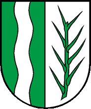 Wappen von Diesbach Kanton Glarus Schweiz